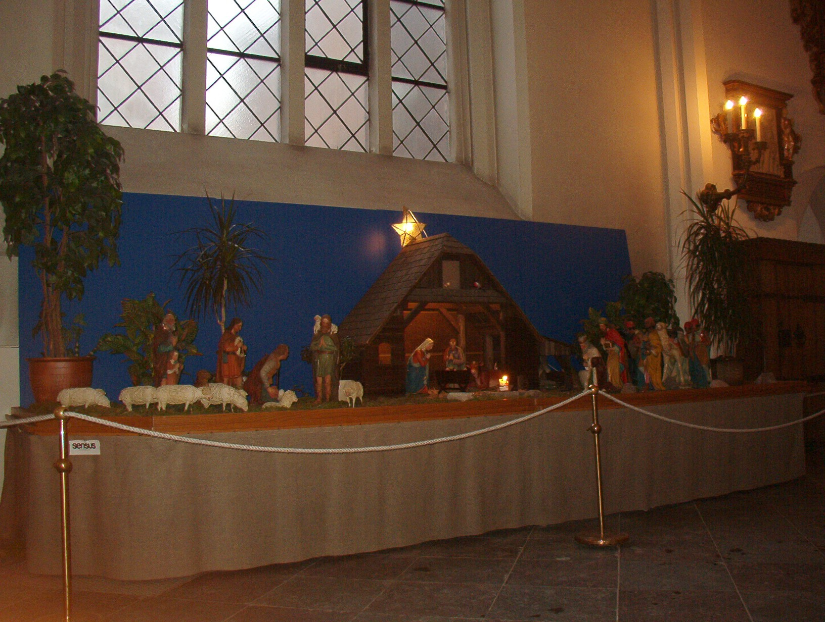 December, 2005 See also a close-up at Image:Julkrubba, Sankt Petri kyrka, närbild.jpg